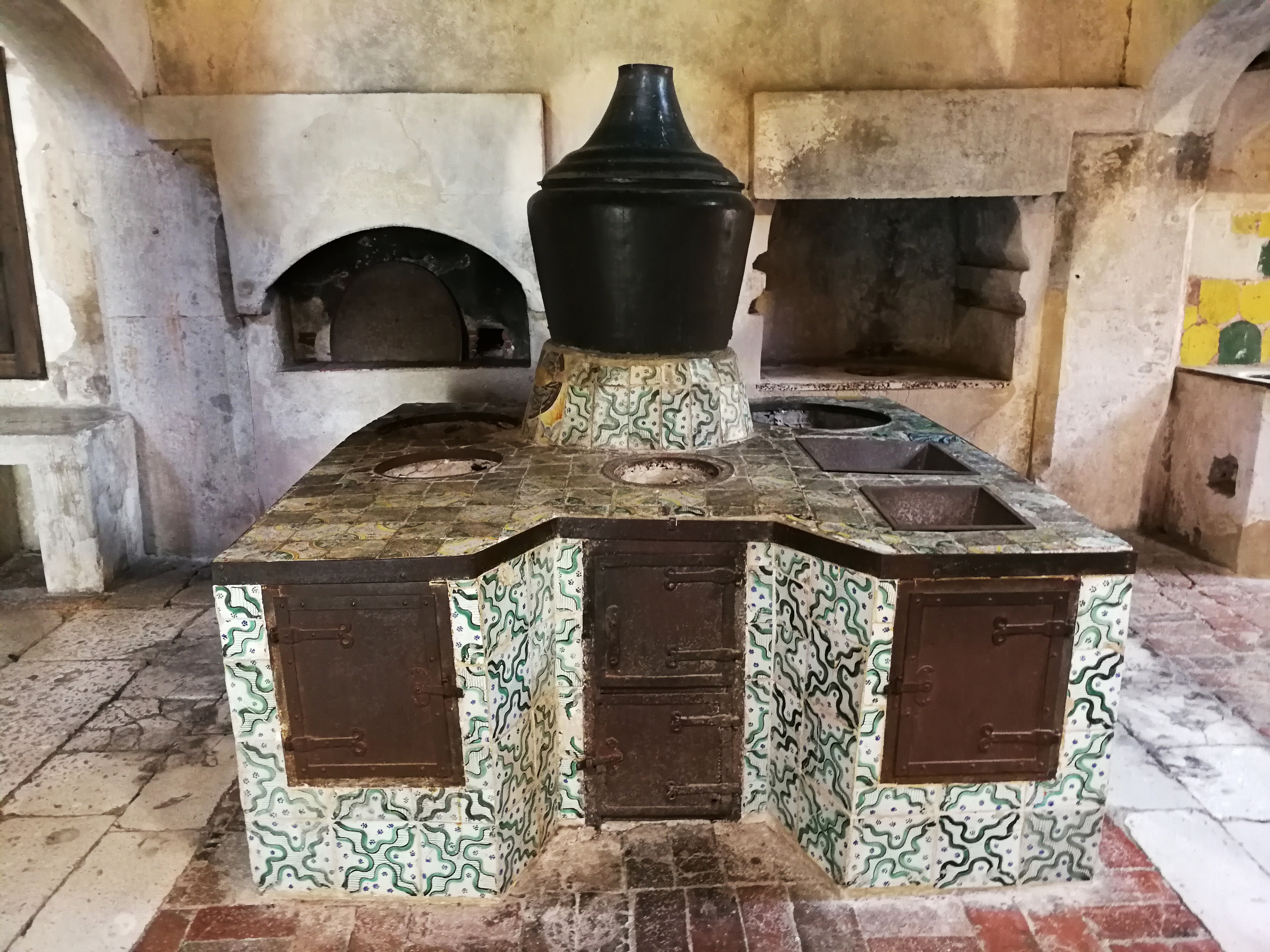 certosa di Padula This is a photo of a monument which is part of cultural heritage of Italy.